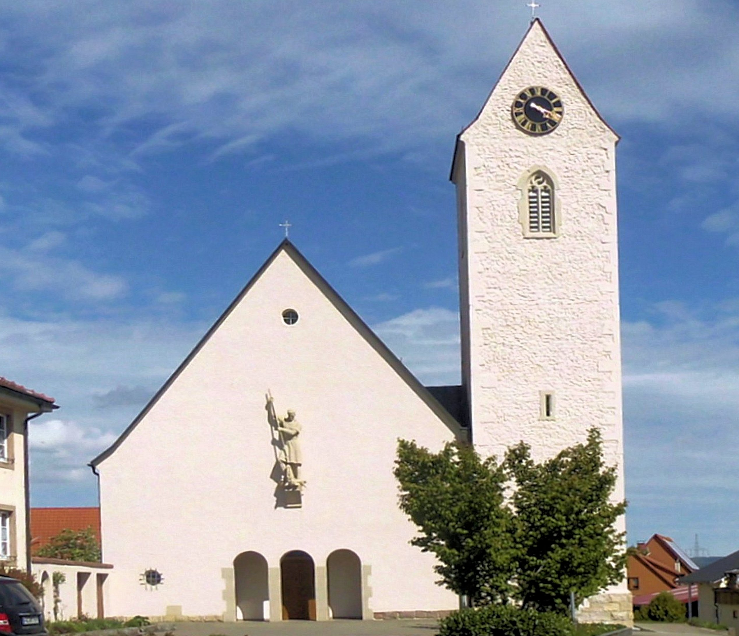 Kirche St. Georg in Unadingen, Stadt Löffingen, Deutschland